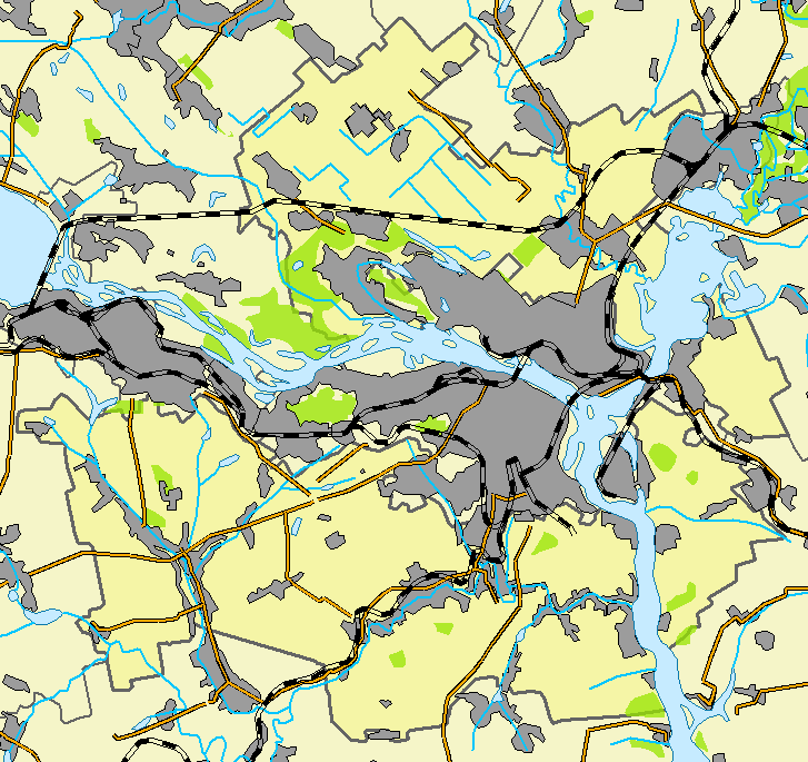 Днепропетровский район, Днепропетровская область, Украина.